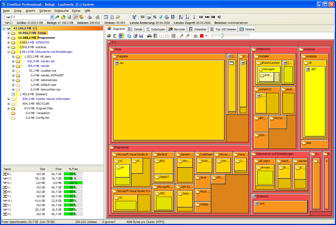 Bildschirmfoto von TreeSize Professional V5.1.1